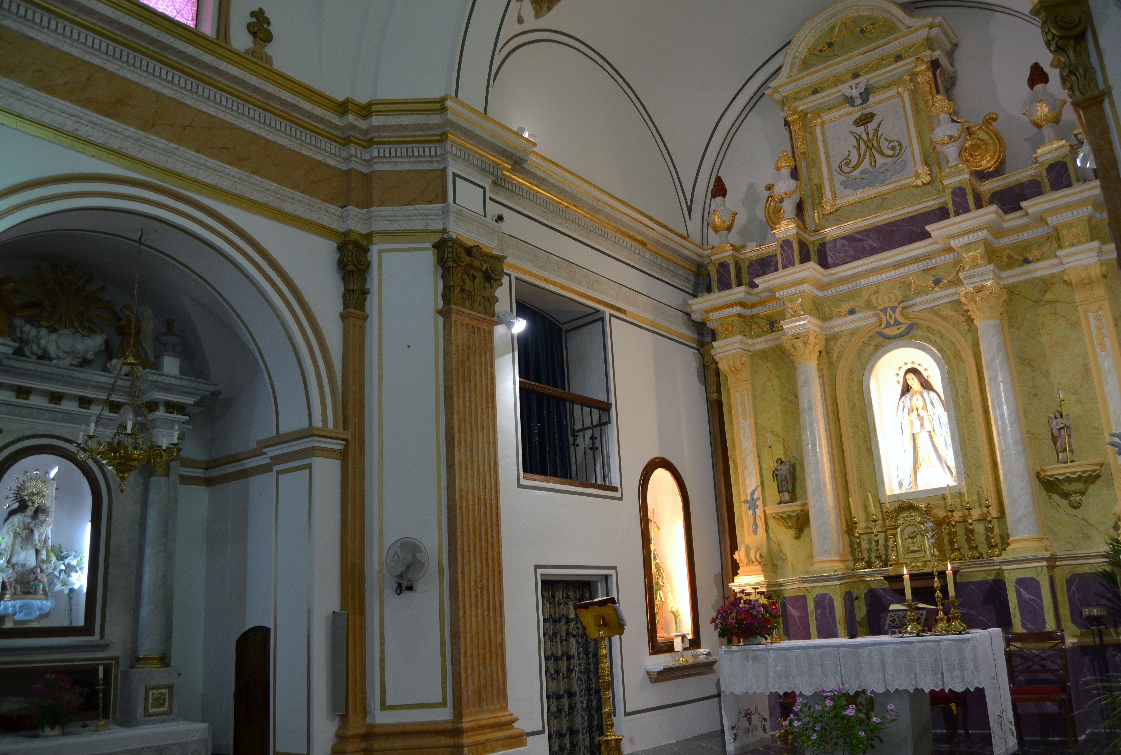 Interior de l'església de la Concepció, la Llosa de Camatxo. 30.006-003.